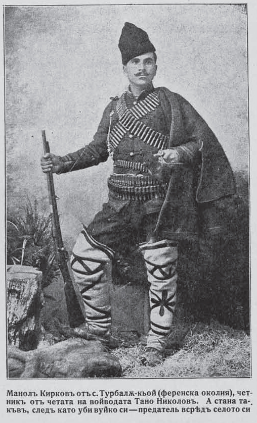 Manol Kirkov from Torbali IMARO